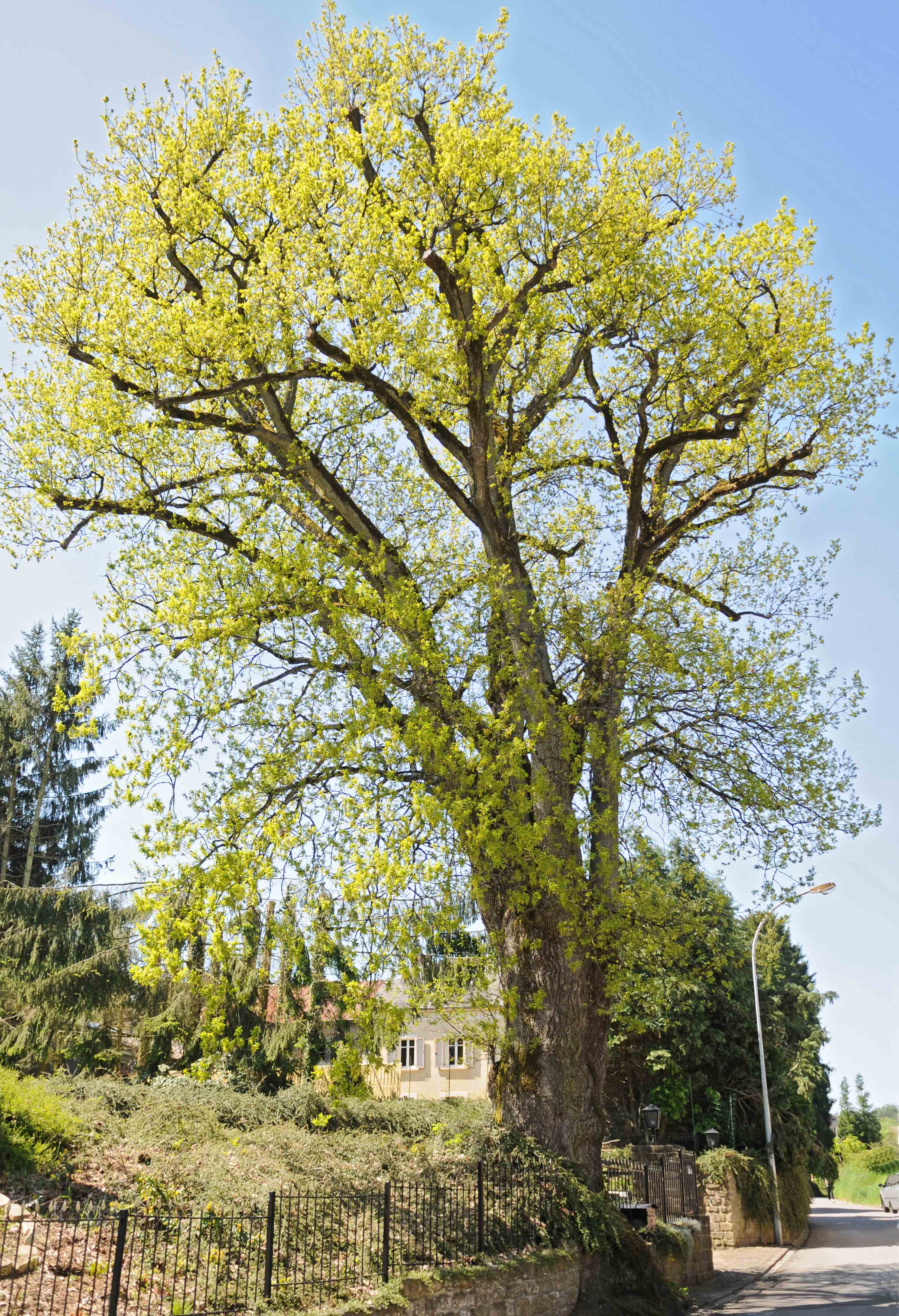 Bemierkenswäert Eech zu Guedber.